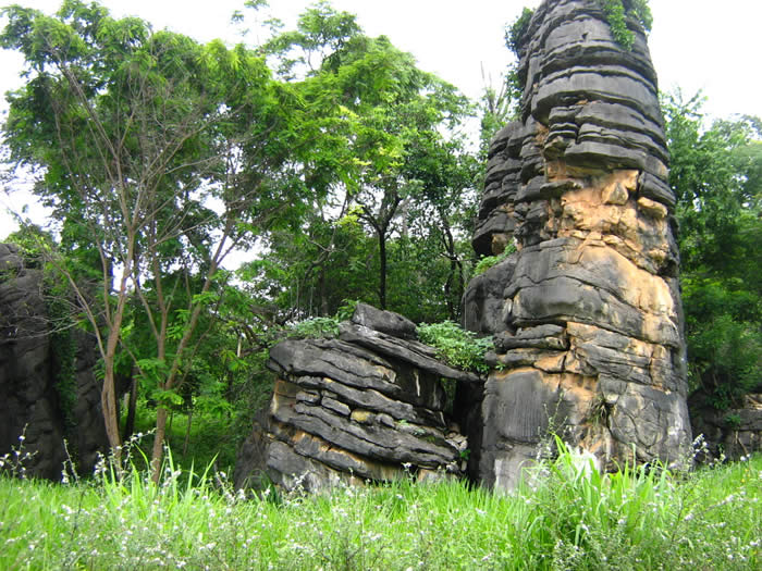 Sítio do Rio Grande - São Desidério-BA I 31/12/2010 10:21